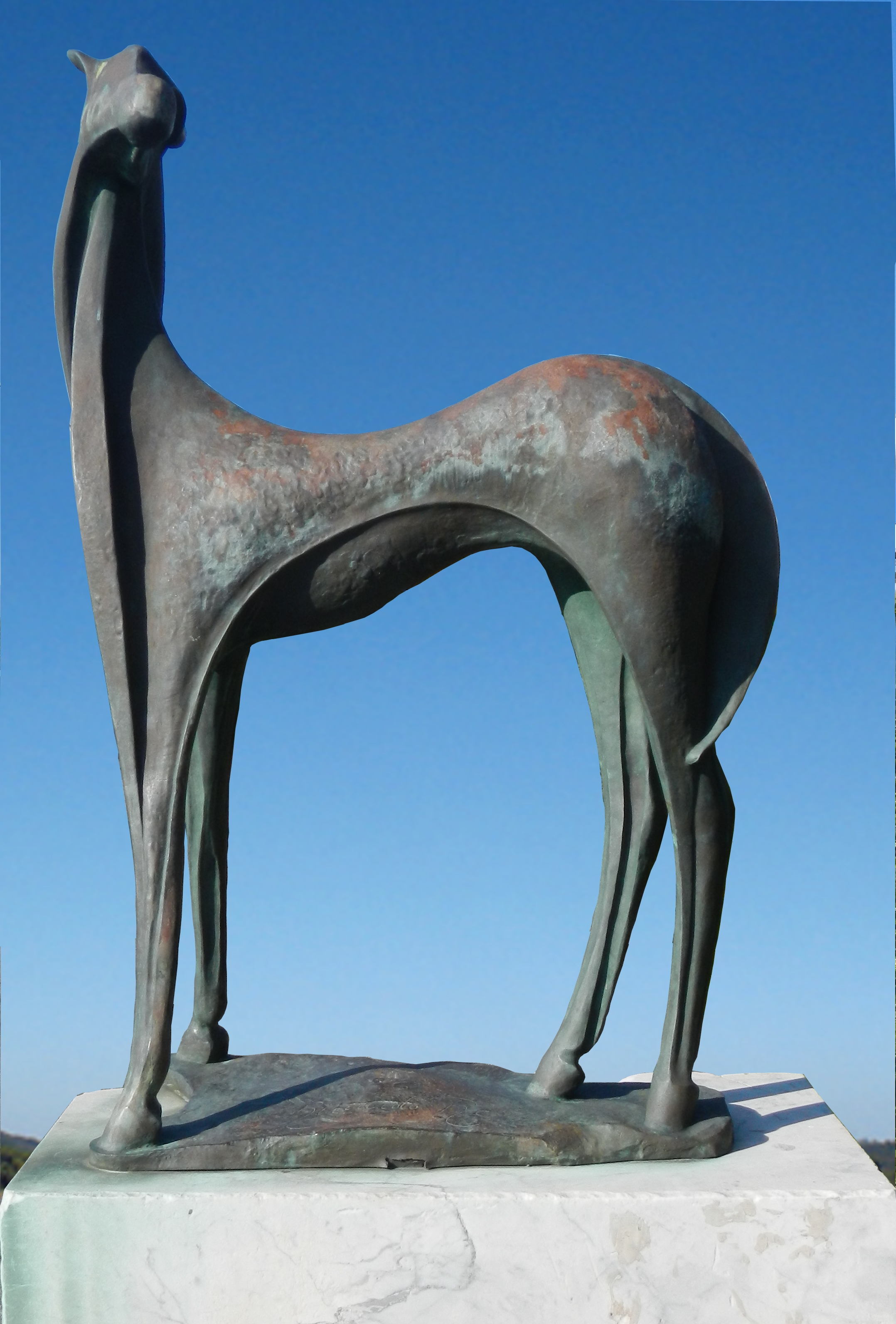 Cavallino in Bronzo, Lungomare Marina di Massa - Pontile